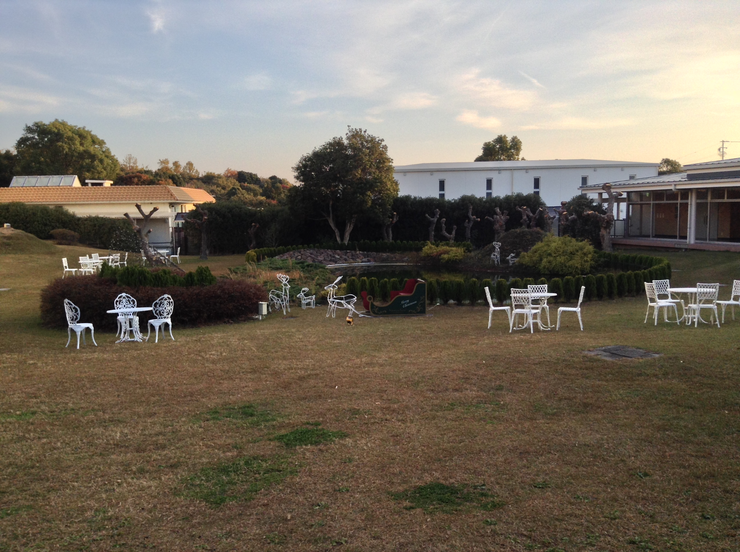 Hamajimacho Hazako, Shima, Mie Prefecture 517-0403, Japan